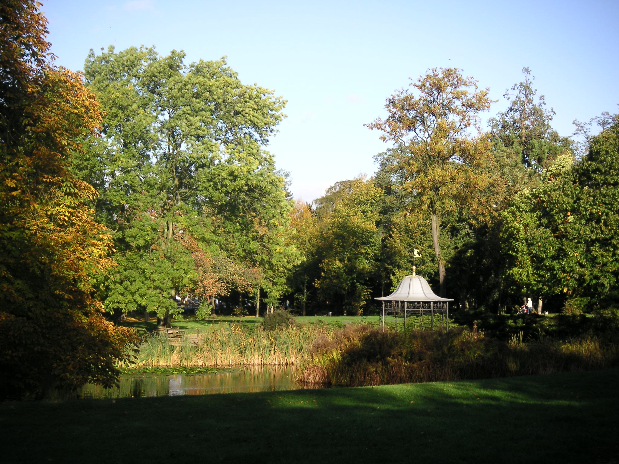 Prinz-Emil-Garten in Darmstadt